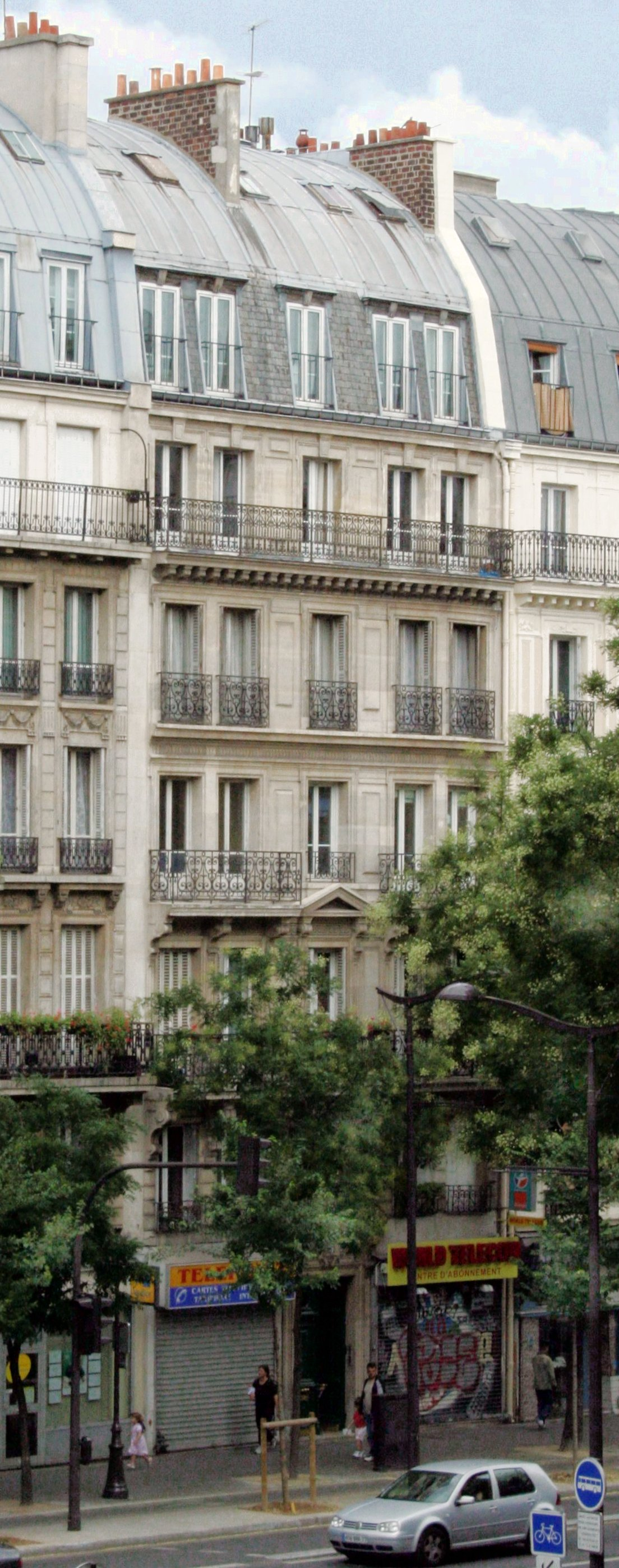 Photo d'un immeuble de rapport (hausmannien) du boulevard de Magenta, Paris 10.